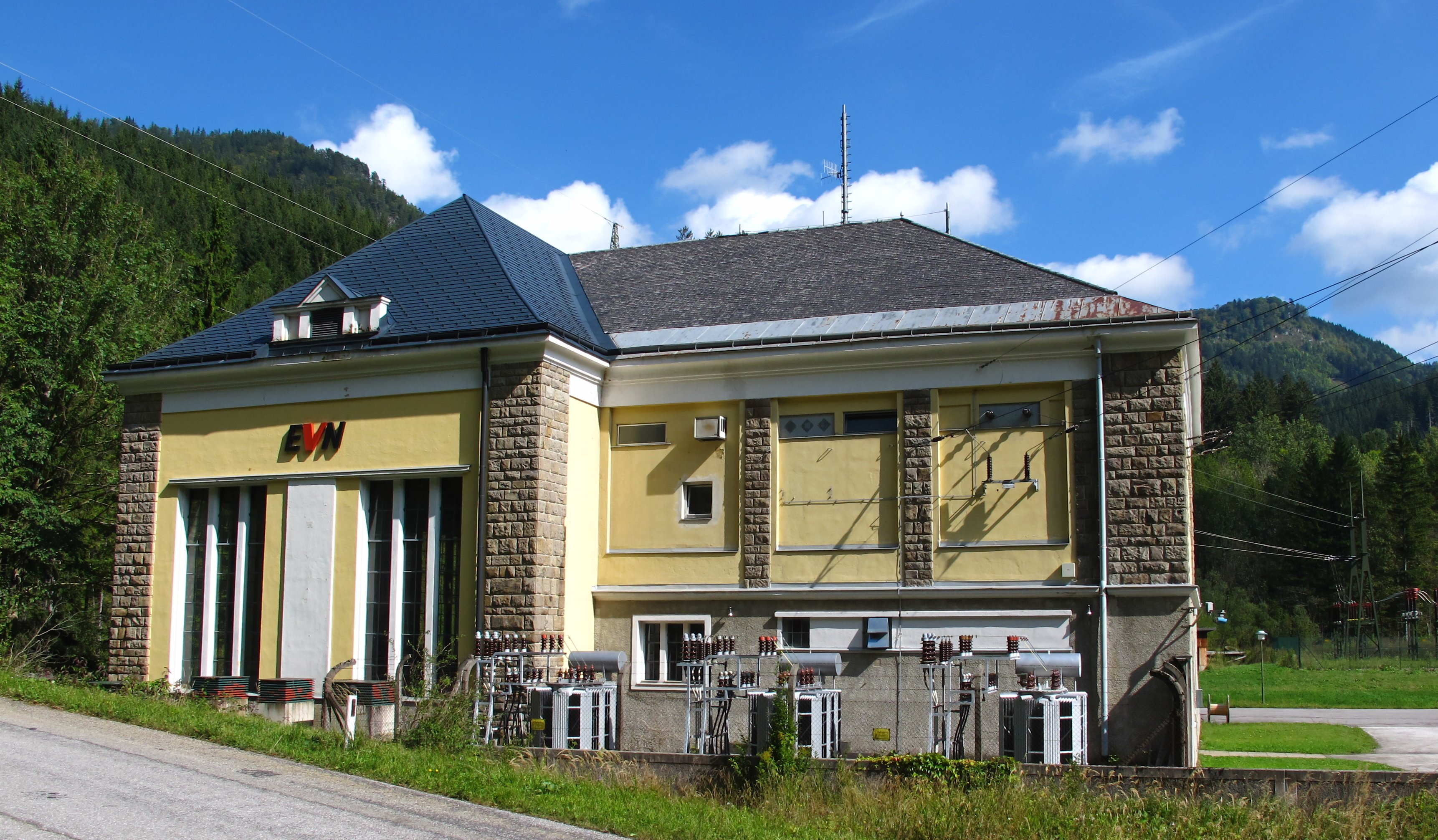 Wasserkraftwerk Erlaufboden